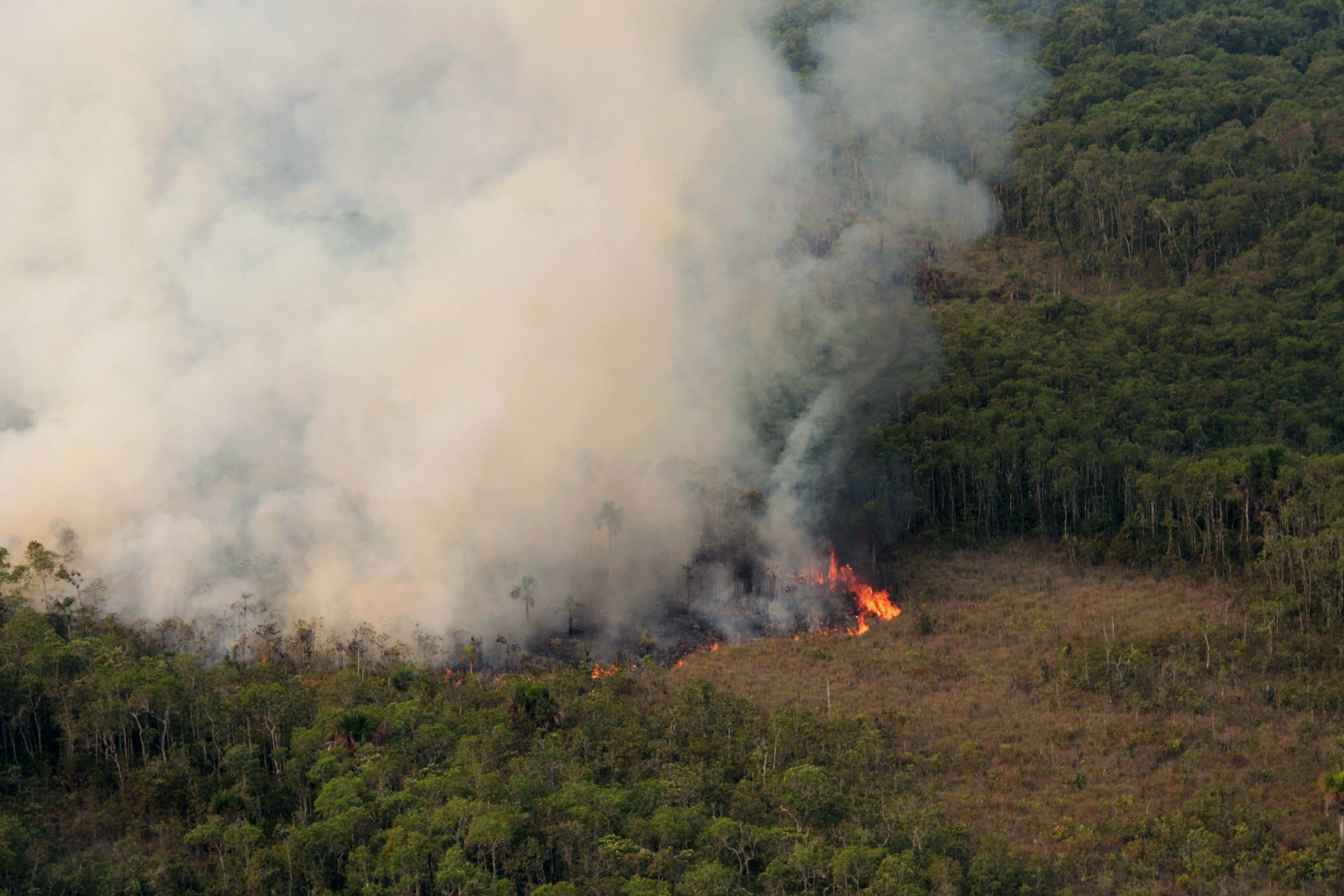 Prevfogo/Ibama combate incêndio florestal no Parque Indígena do Xingu, no Mato Grosso. Foto: Vinícius Mendonça - Ascom/Ibama